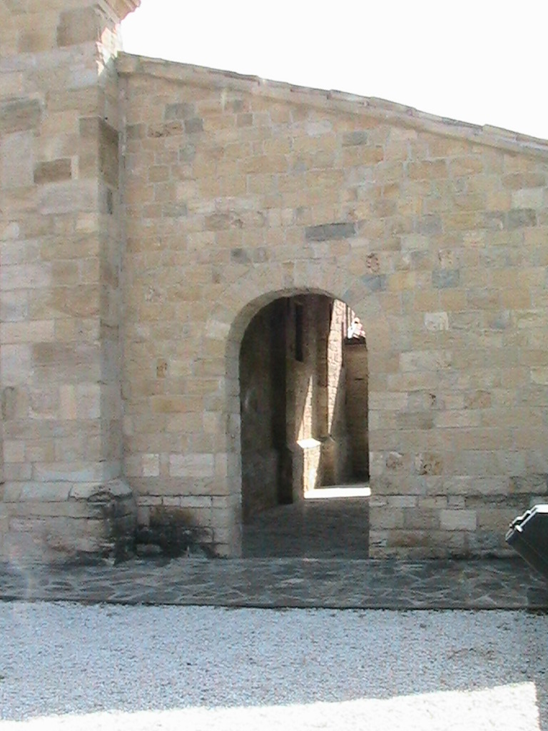 Careno (Pellegrino Parmense) - Santuario della Beata Vergine Assunta